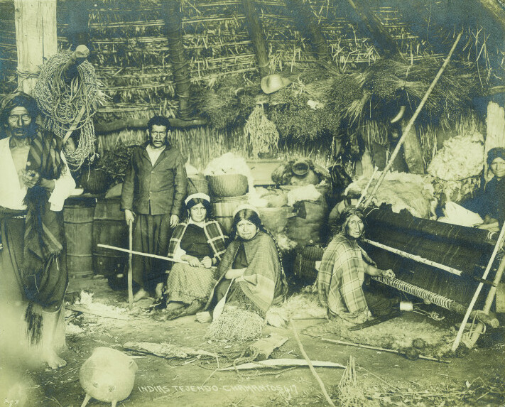 Interior de ruca Mapuche. ca. 1895. Fotografía, copia en papel. 24 x 19,3 cm. N° inventario Fc-887. Odber Heffer fue un destacado fotógrafo canadiense que llegó Chile para trabajar en el estudio “Foto Garreaud", de Félix Leblanc. En 1910 creó su propio estudio y casa comercial en Santiago. Destacó por ser uno de los fundadores de la fotografía etnográfica.